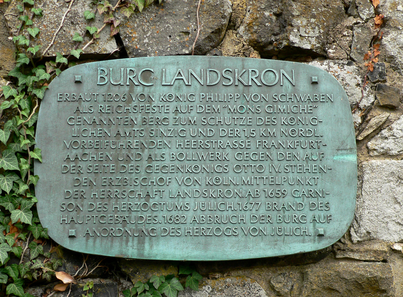 Reichsburg Landskron, Infotafel aus Metall im Bereich Oberste Pforte